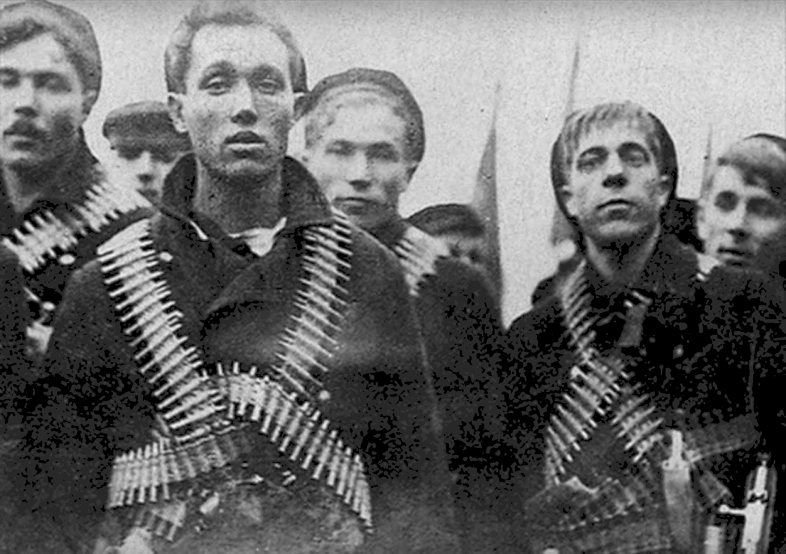 Marins de Kronstadt 1921